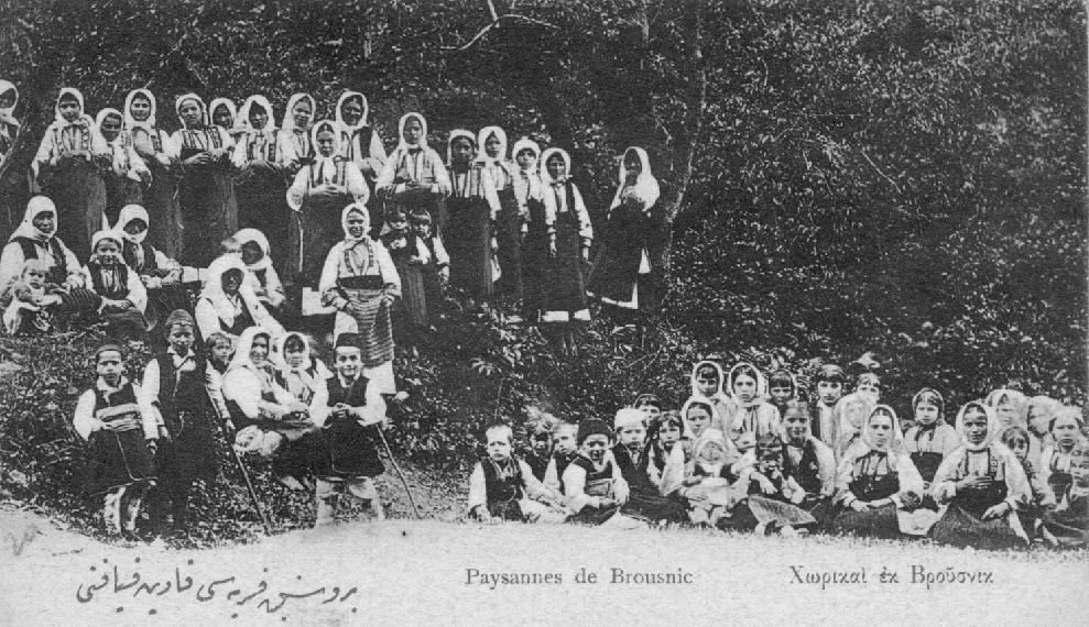 Селяни в село Брусник, Битолско, Македония в началото на 20 век.